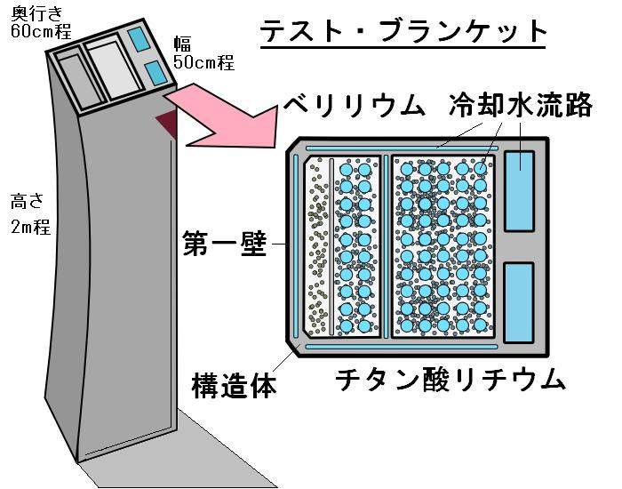 核融合炉の開発テスト用のブランケットの概念図。